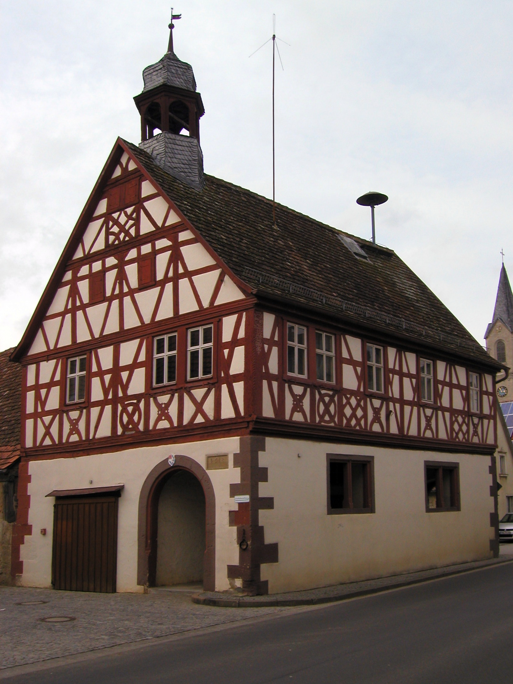 Historisches Rathaus in Bieberehren